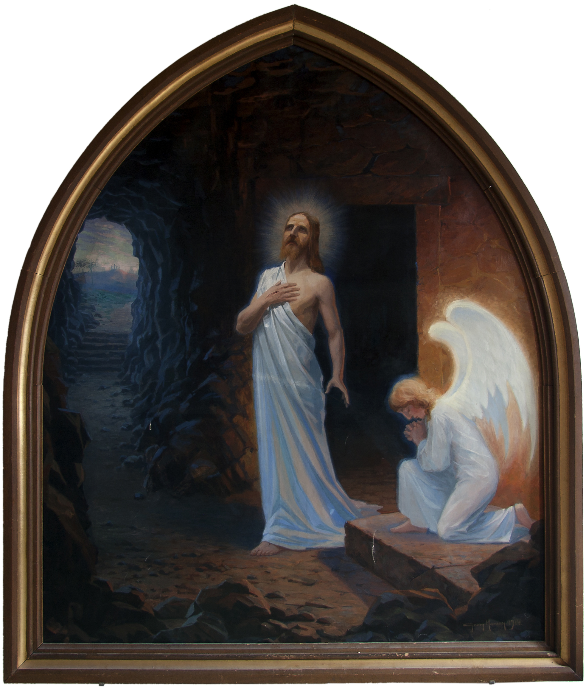 Gamla altartavlan i Hässleholms kyrka, numera placerad i kryptan. Tavlan målades av Georg Hansen, 1868–1932.